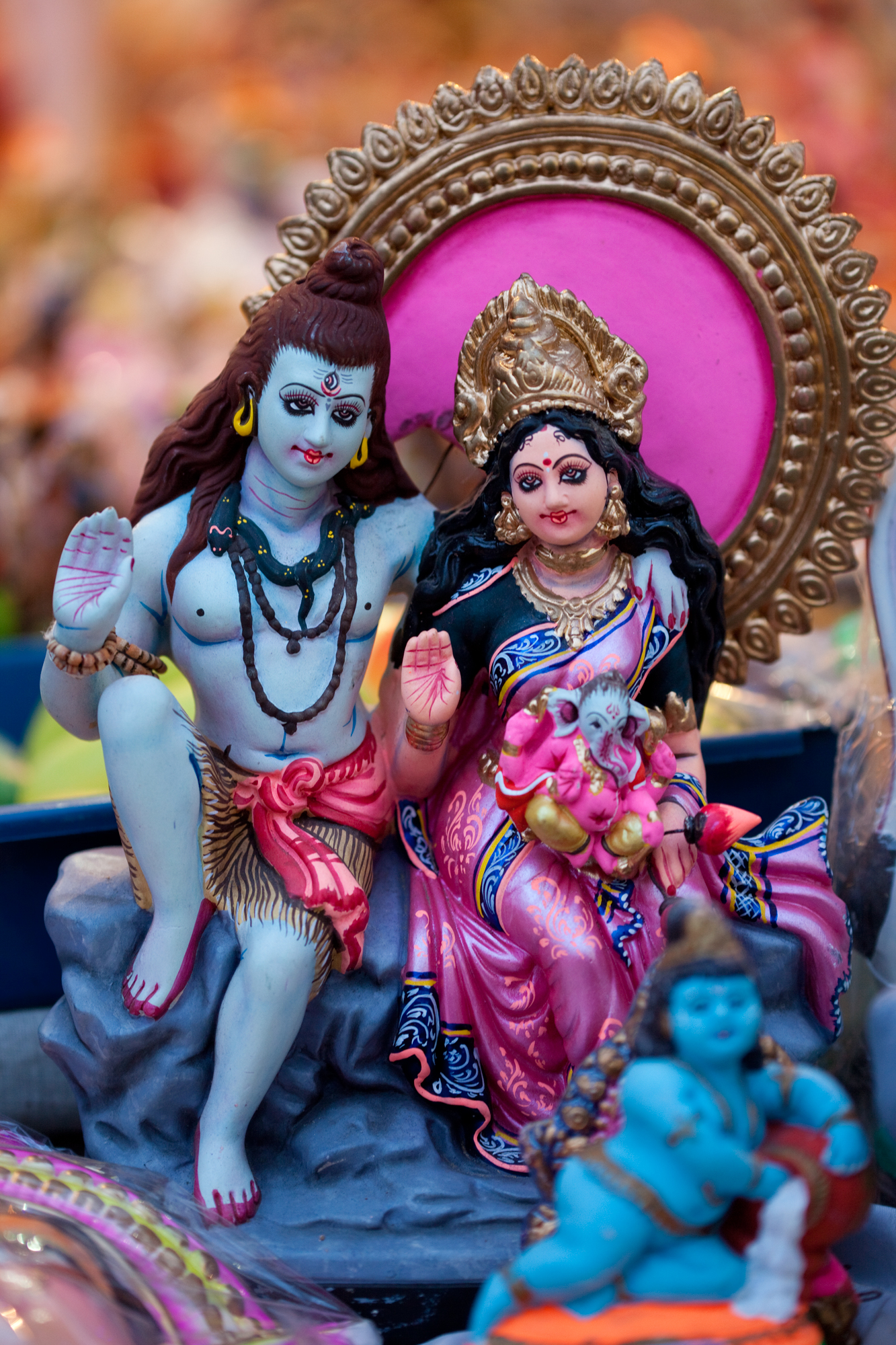 Shiva Parvati - Navarathri Golu Dolls